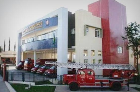 Foto da Central do Corpo de Bombeiros de Londrina